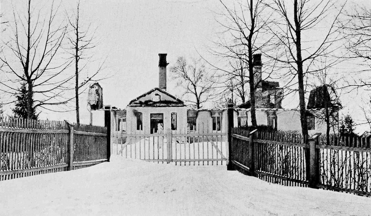 Spāre mõisa peahoone pärast 1905. aasta põlengut.